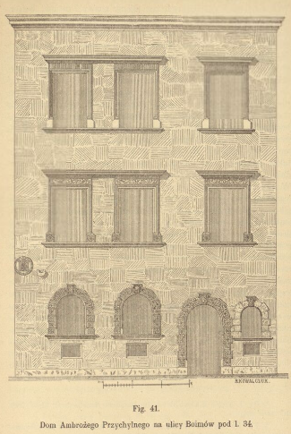 Дім Амброджо Прихильного, Львів